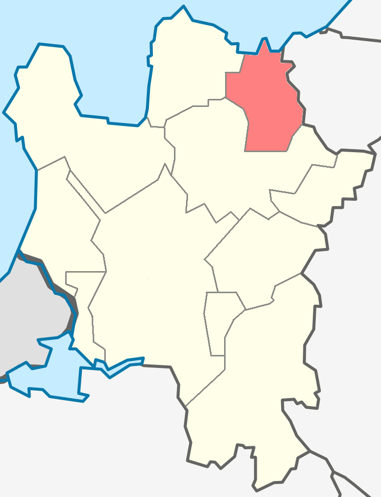 Нежновское сельское поселение на карте Кингисеппского района